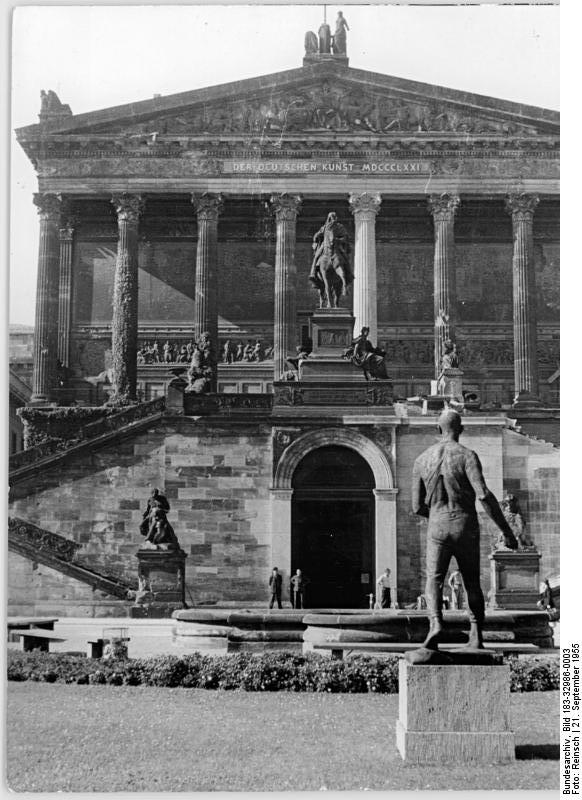 Berlin, Nationalgalerie Zentralbild Reinsch 4 Motive 21.9.1955 Die National-Galerie in Berlin In der National-Galerie in Berlin werden die 750 Gemälde der Dresdener Galerie, die durch den hochherzigen Entschluß der Sowjetregierung an die DDR übergeben wurden, gezeigt werden. Die Bauarbeiten zur Vorbereitung der Gemäldesammlung sind in vollem Gange. UBz: Die National-Galerie, Vorderansicht. Blick auf den Eingang.